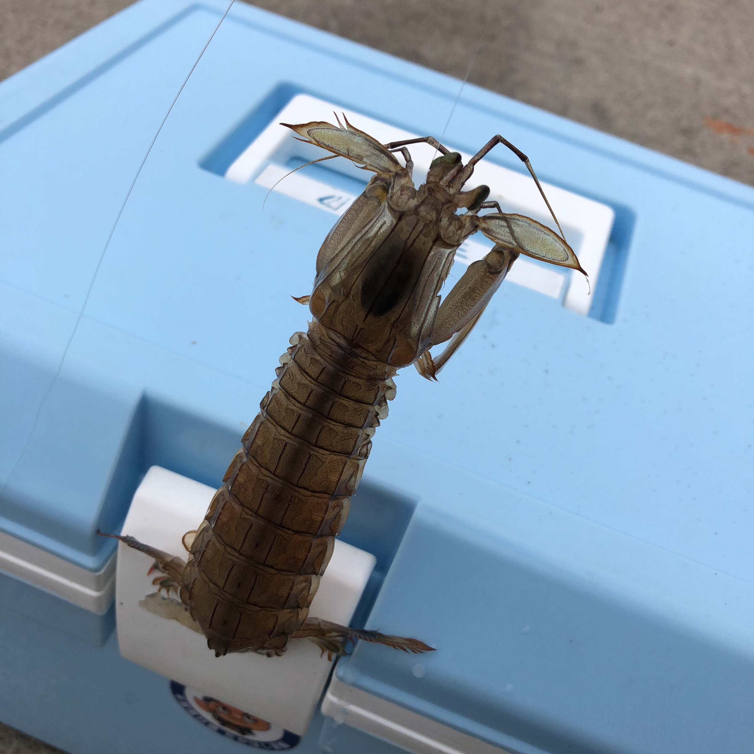 シャコ（背側） 2018.8.13 那珂湊漁港